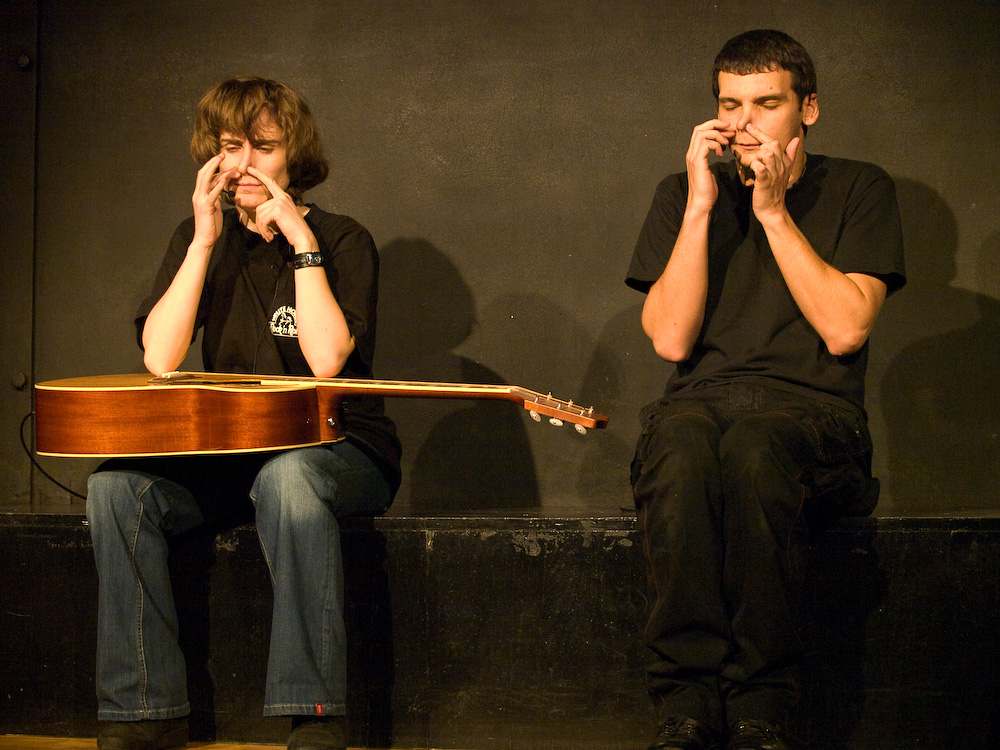 Formația Fără Zahăr